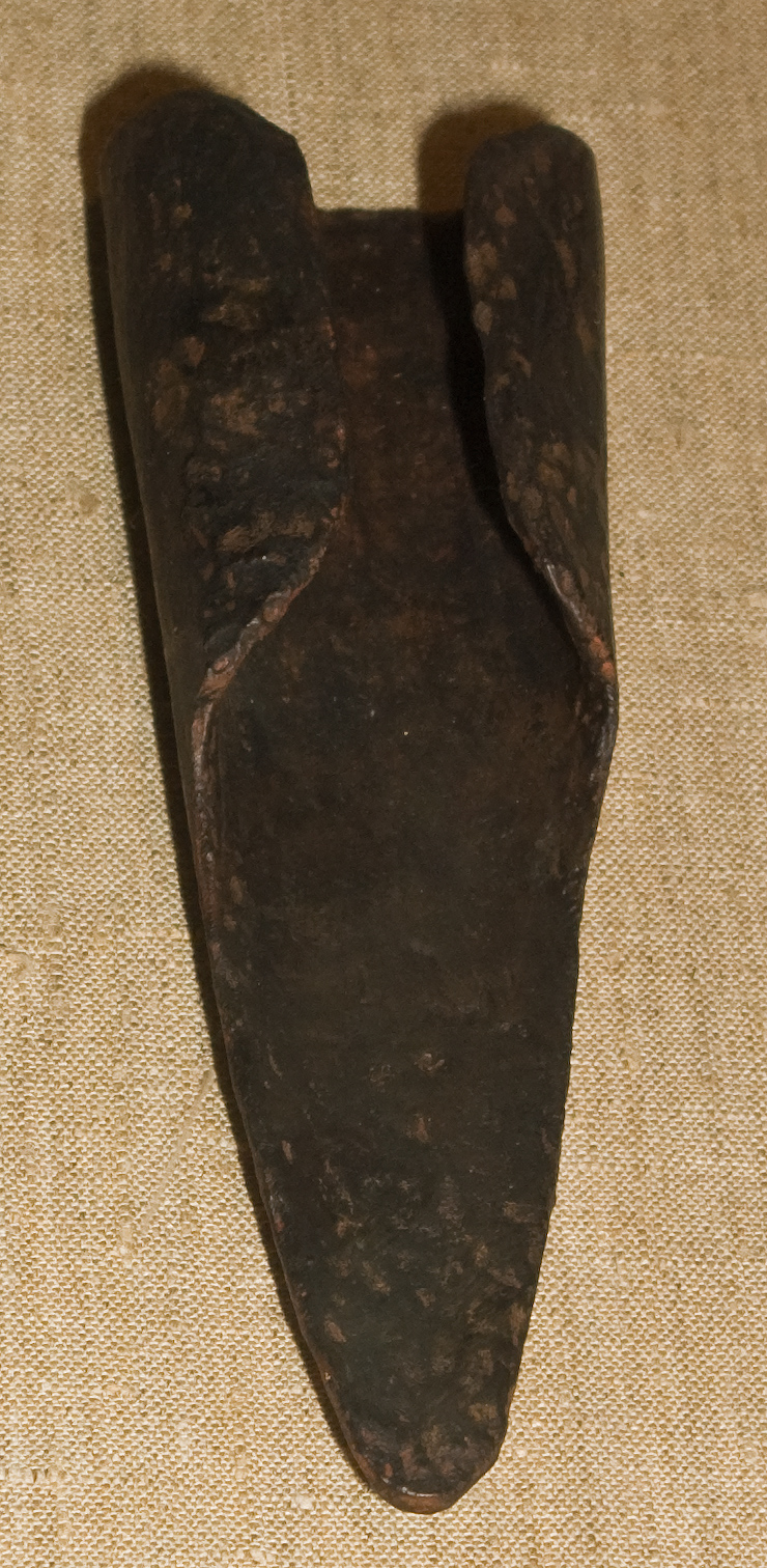 Сошник. (железо). Гродище Городец. Лужский район, Ленинградская область. Государственный музей истории Санкт-Петербурга.